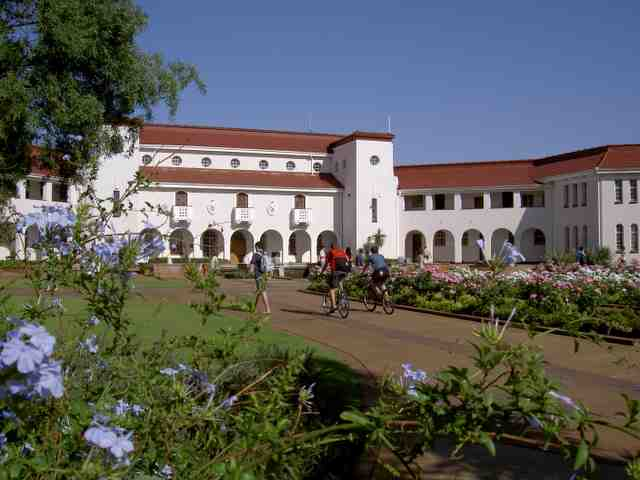 Hoofdgebouw van de universiteit van Potchefstroom, oktober 2005, omstreeks 8.30. Mooiste en bekendste gebouw van Potchefstroom, en het culturele centrum van de stad en diens omgeving. Populair als achtergrond bij trouwerijen.